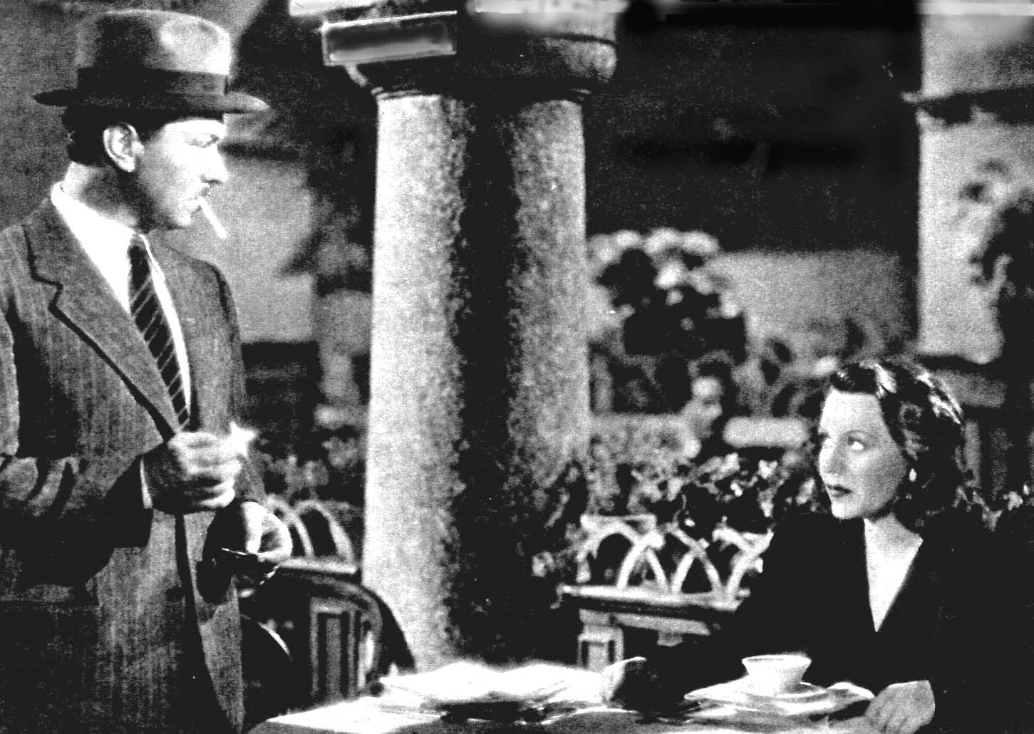 Gino Cervi e Paola Barbara ne "La peccatrice" (Palermi, 1940)